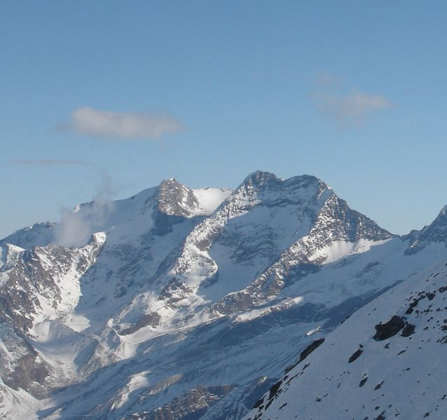 Fletsch- und Lagginhorn (v.l.n.r.)